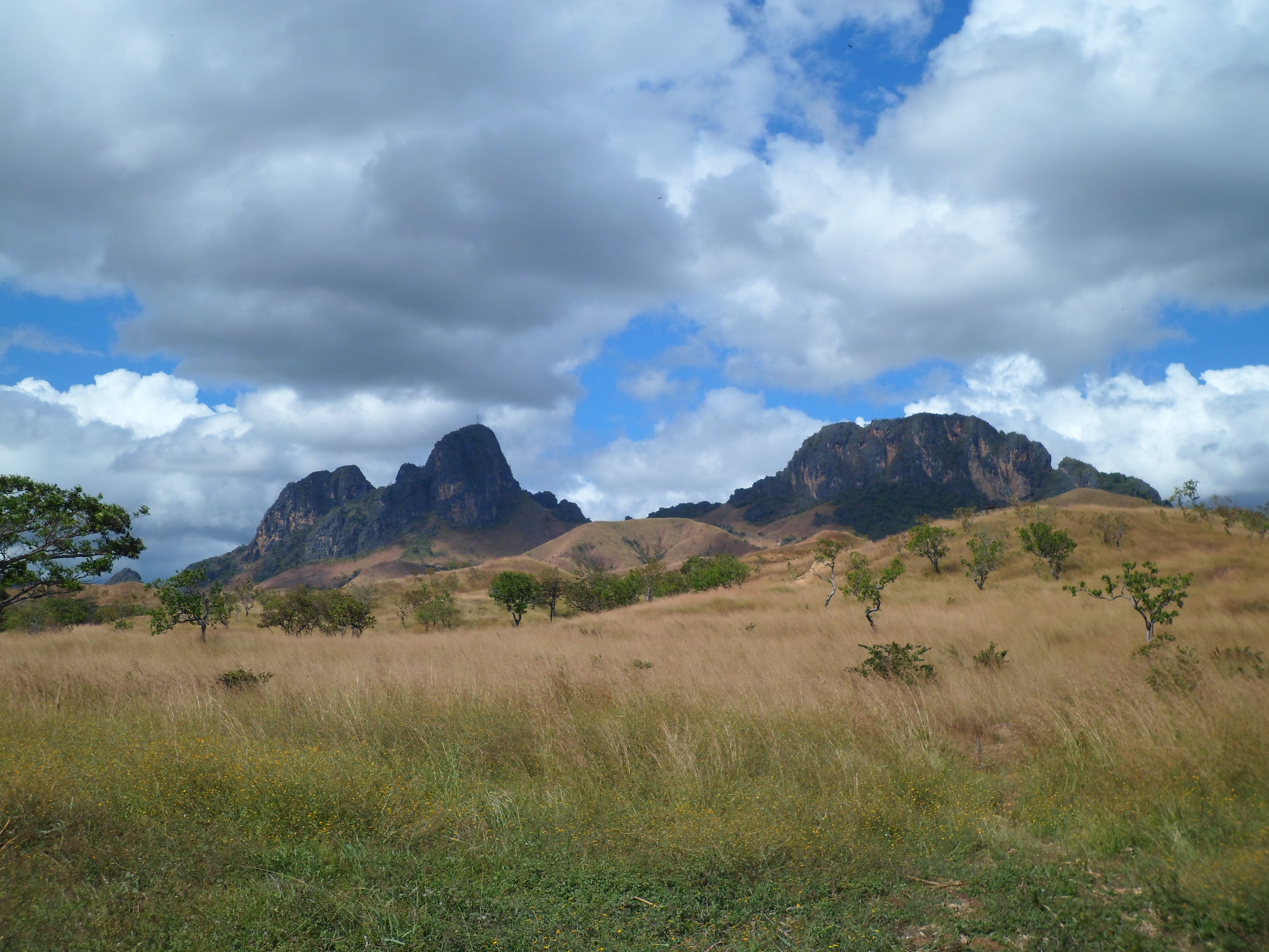 CIELO, MORROS, Y SENDEROS.